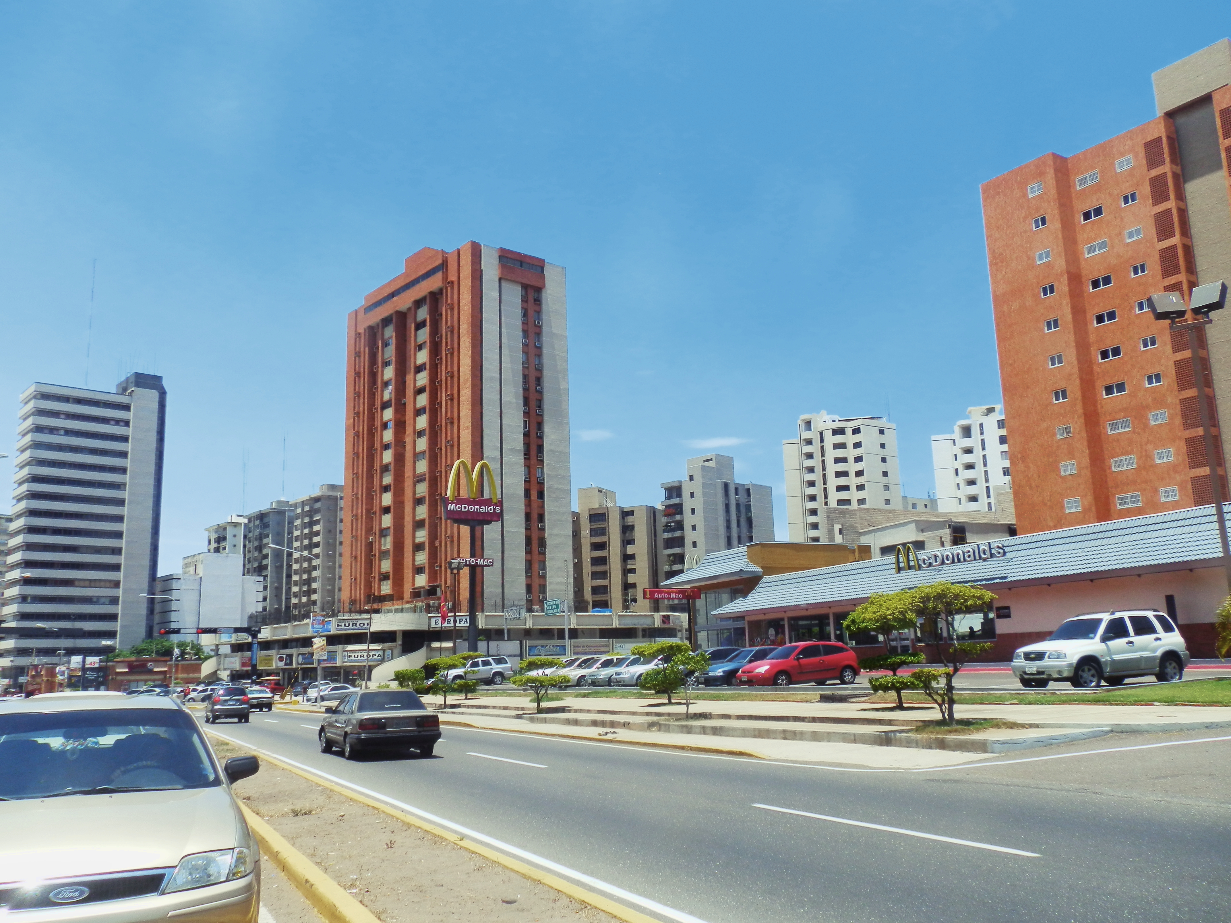 Edificios en la avenida 5 de Julio de Maracaibo, Zulia, Venezuela